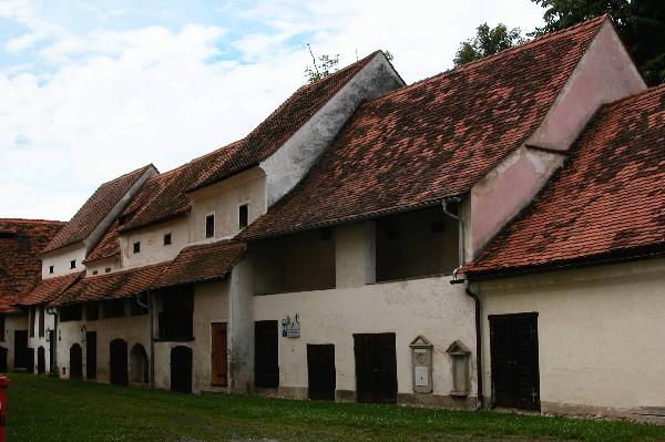 Innenansicht des Feldbacher Tabors.